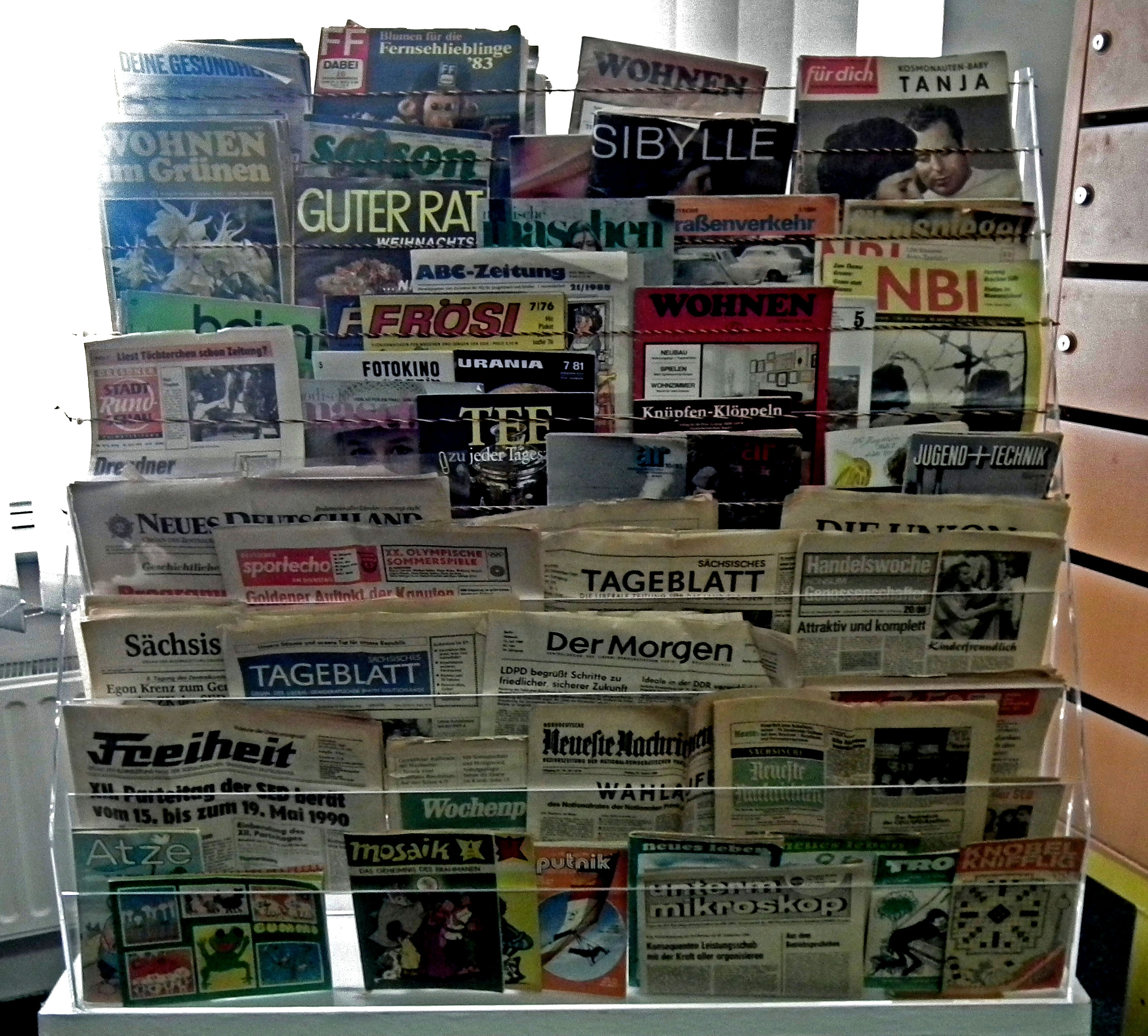 DDR Museum Zeitreise Radebeul, Zeitungen der DDR, Fotografiert mit Genehmigung der Museumsleitung